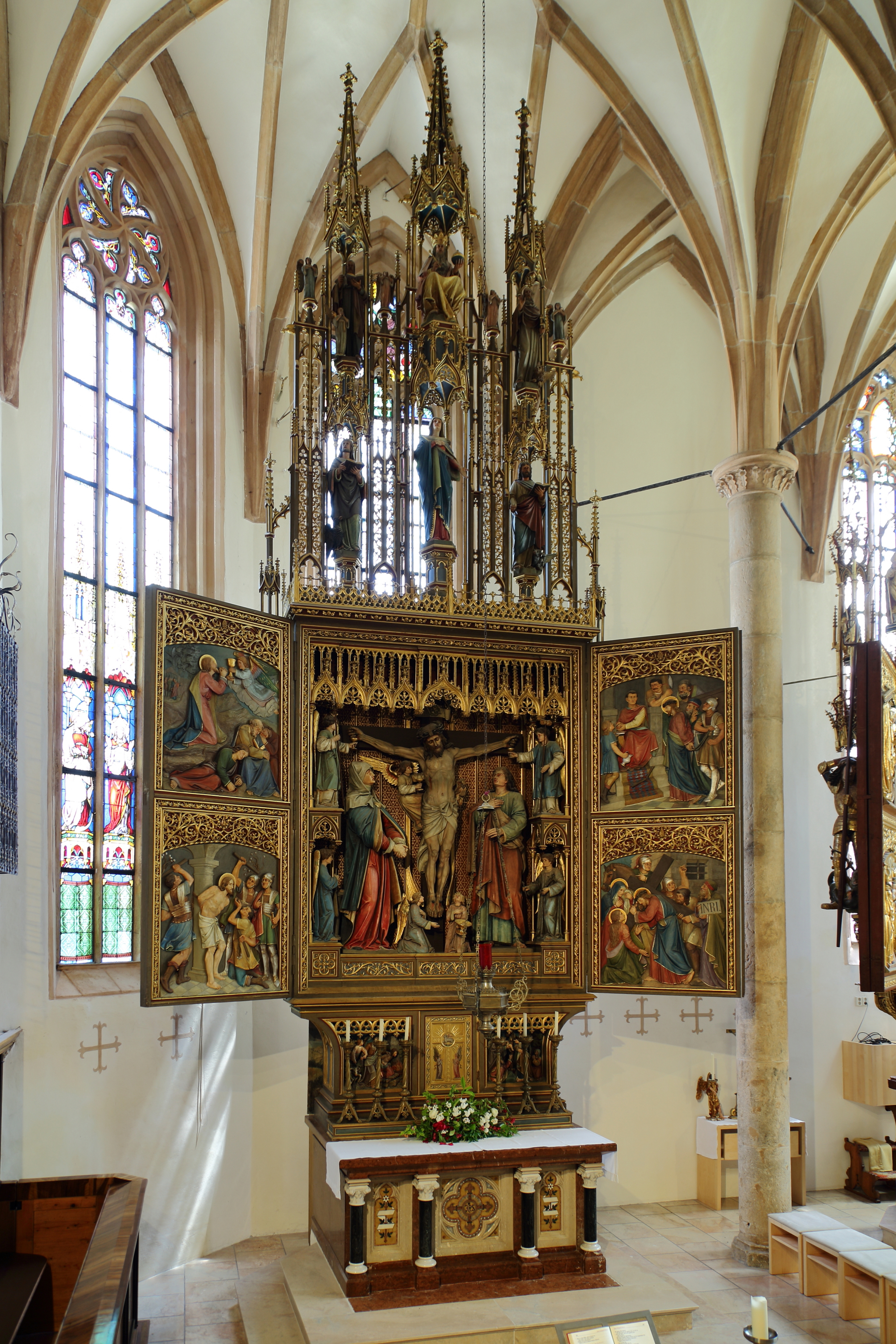 Der neugotische Kreuzaltar in der katholischen Pfarrkirche Mariä Himmelfahrt der oberösterreichischen Marktgemeinde Hallstatt. Der Altar wurde von Professor Ritter von Liewel entworfen und von Lehrern und Schülern in den 1880er Jahren in dreijähriger Arbeit hergestellt.